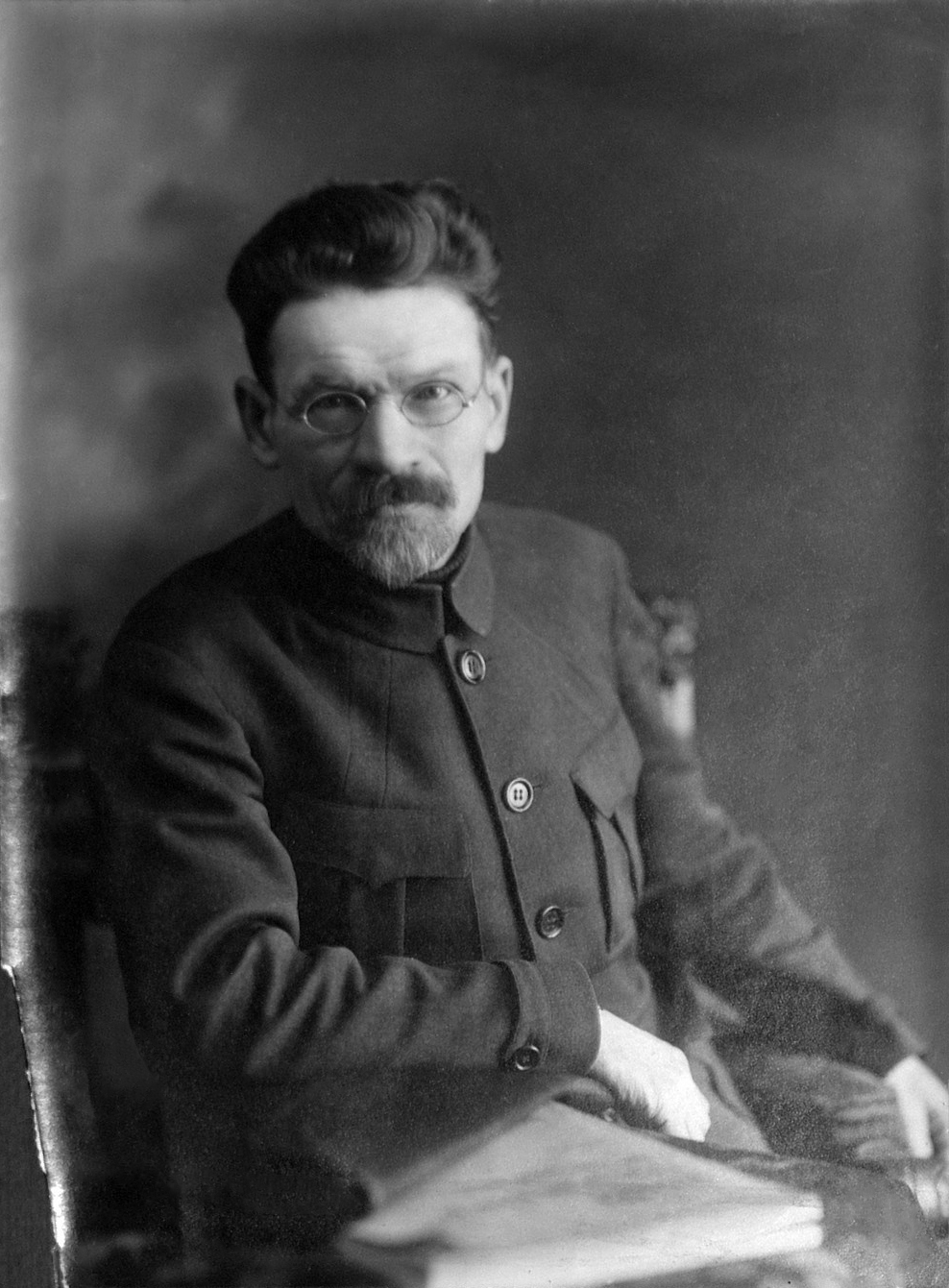 М. И. Калинин, Москва